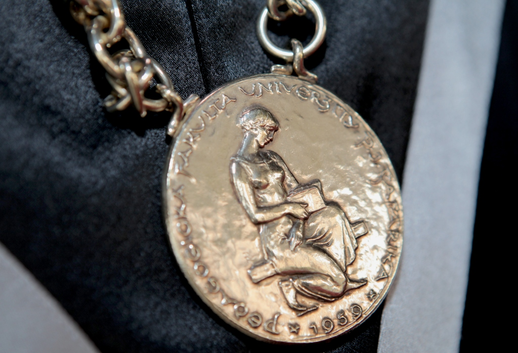 insígnia Pedagogickej fakulty PU